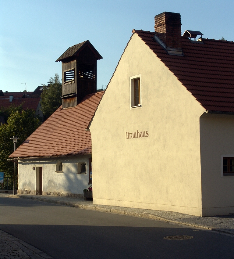 Komunbrauhaus in Falkenberg (Oberpfalz). Hier wird das bekannte Zoiglbier gebraut. (2005) Copyright Status: GNU Freie Dokumentationslizenz